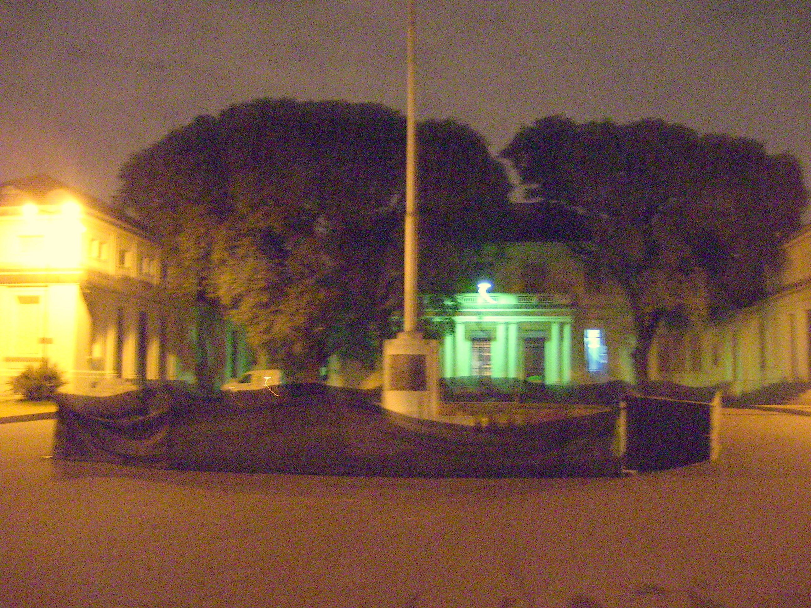 Facultad de Agronomía. Pabellón Central. Universidad de Buenos Aires (foto nocturna)